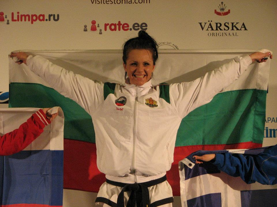 Недялка Бачева